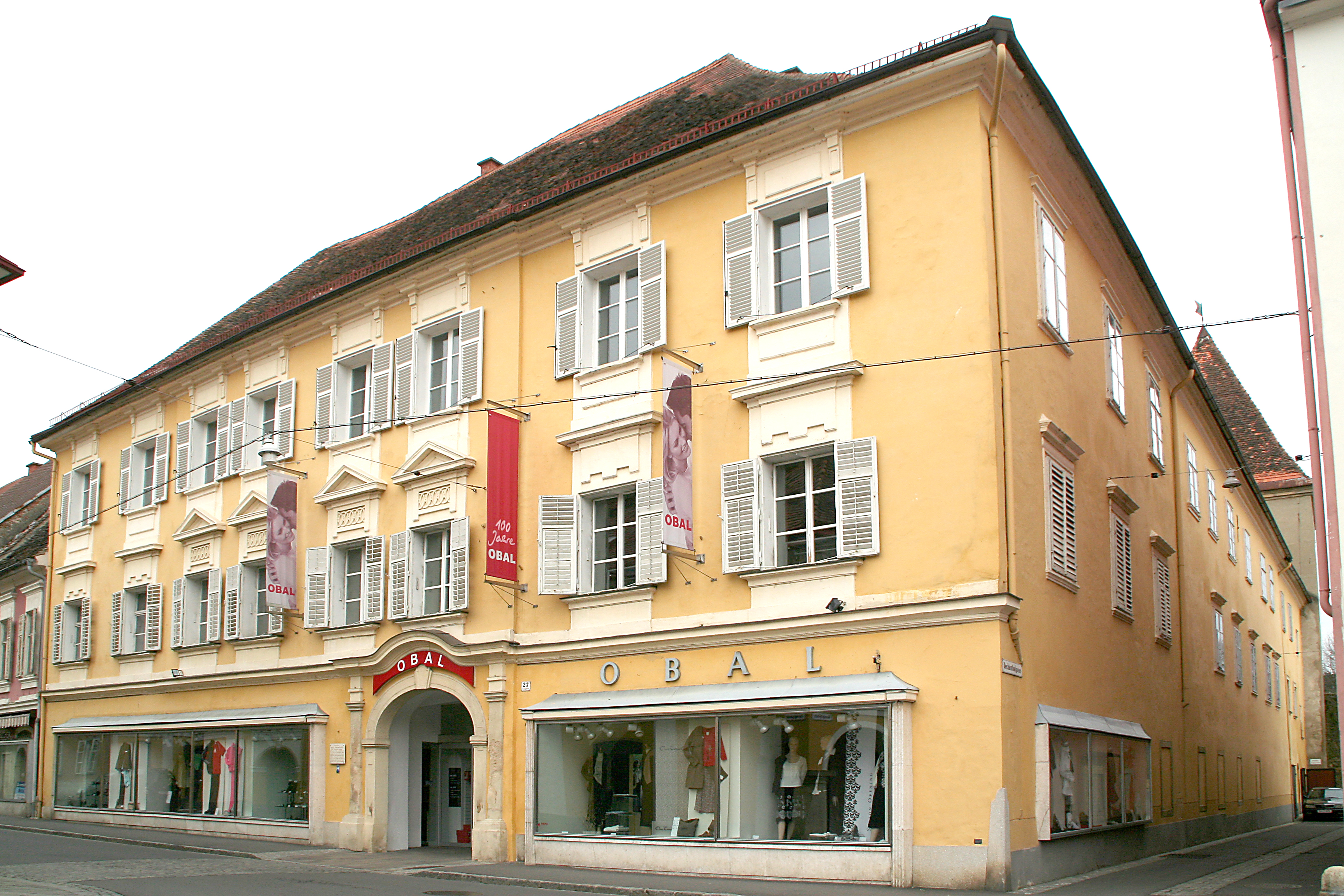 Ehem. Palais Herberstorff, Freysingerhof